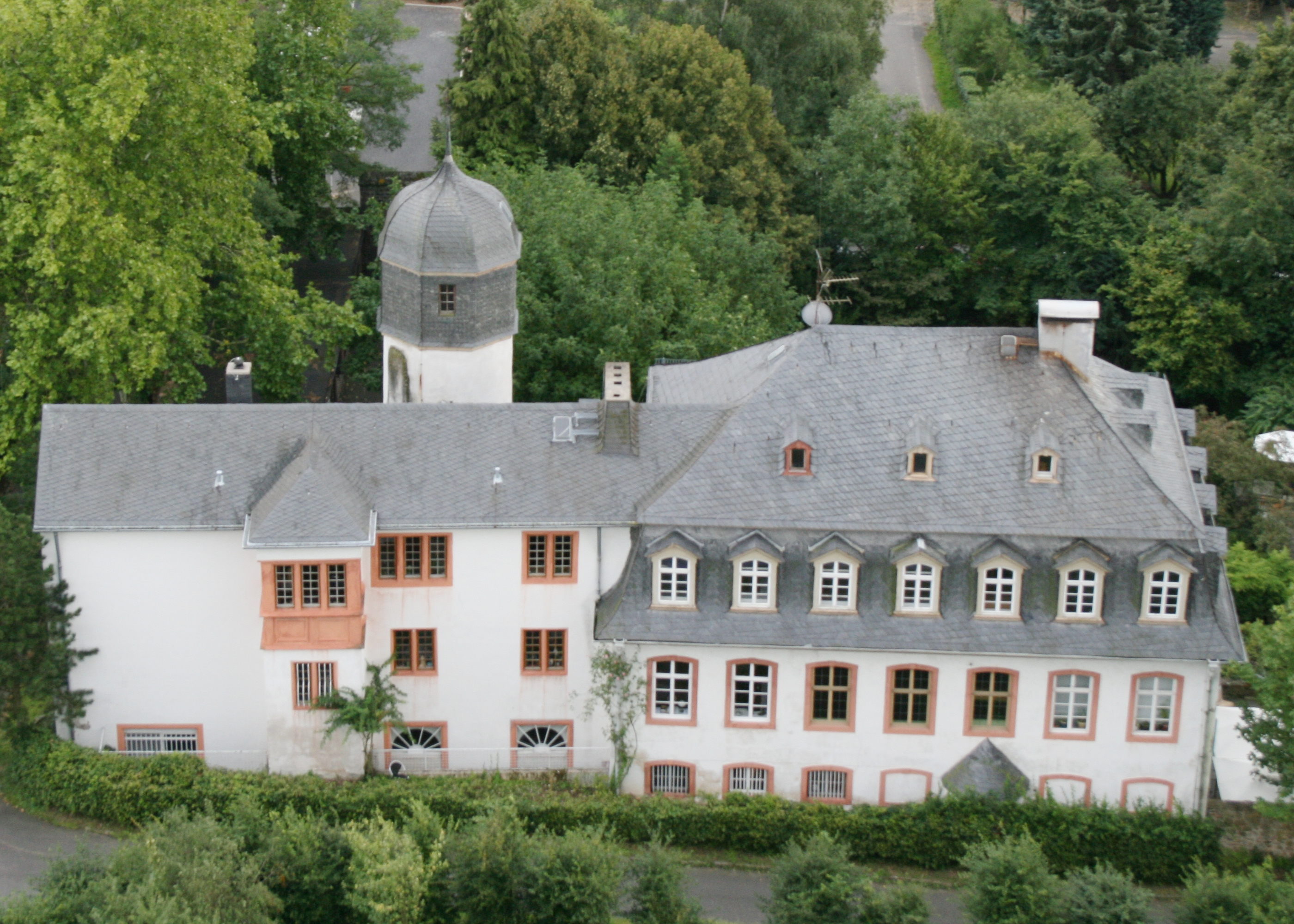 Hattsteiner Hof unterhalb der Burg Münzenberg, 2007.